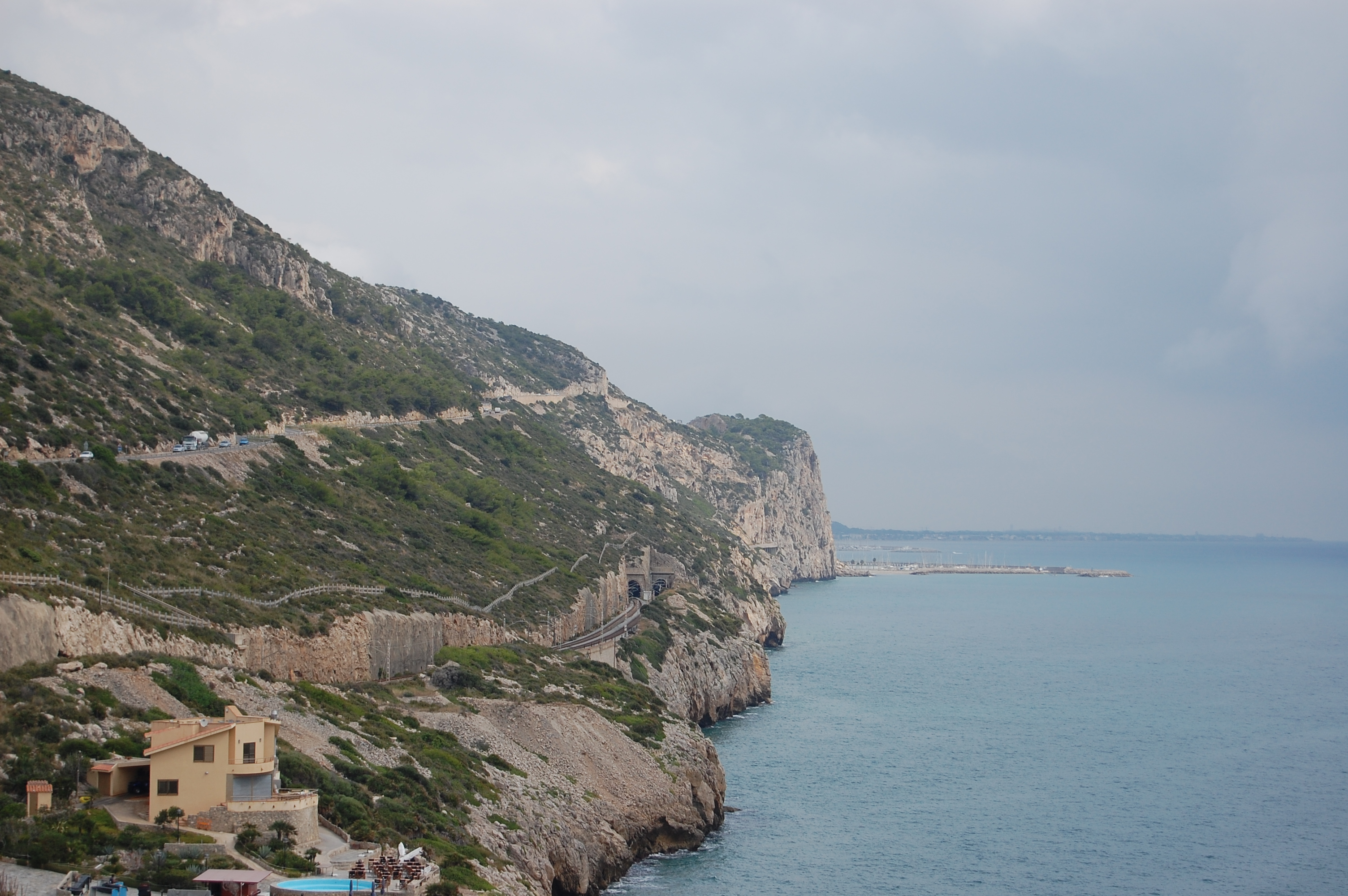 La carretera de les Costes del Garraf vista des de Sitges